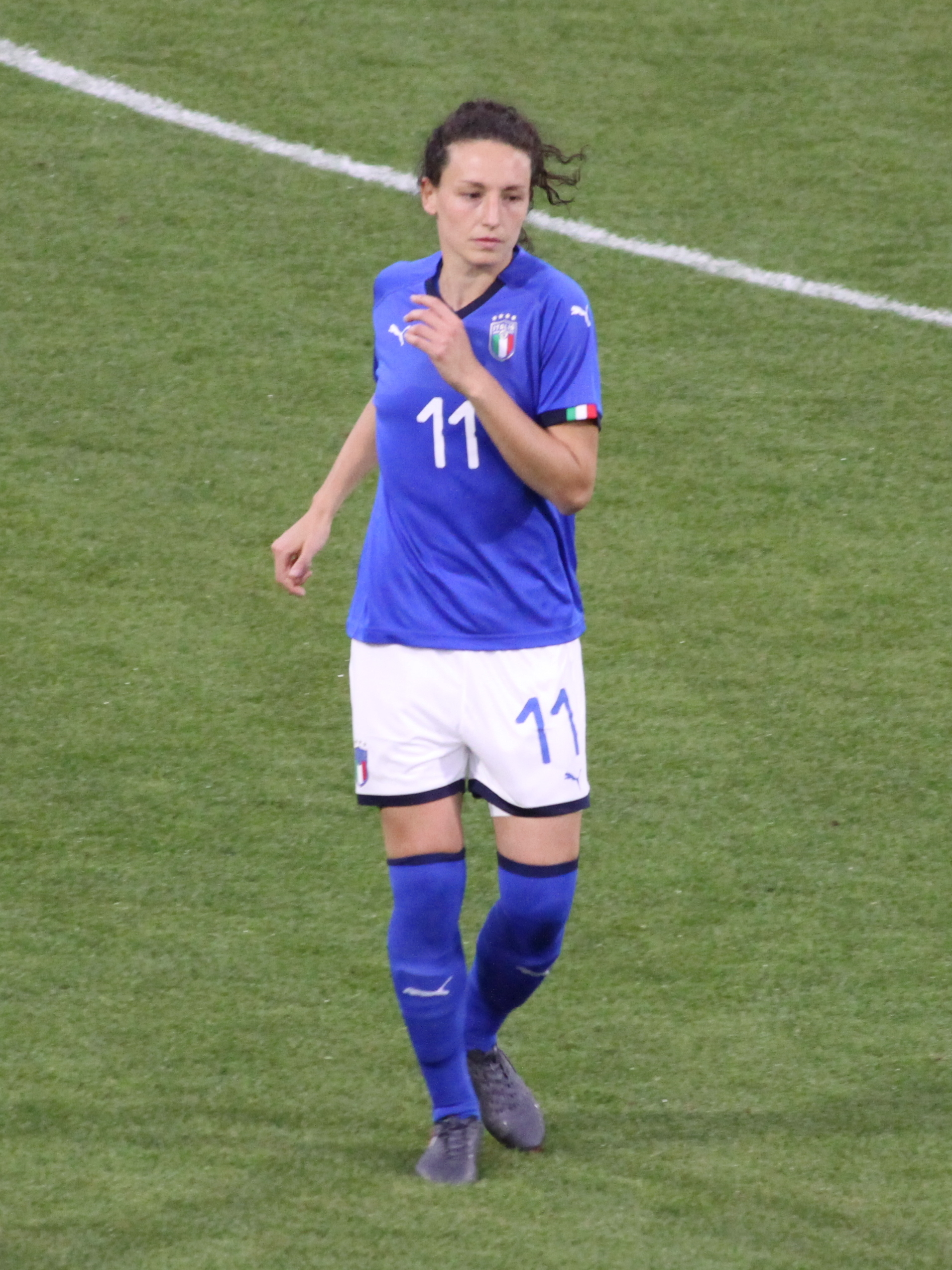 Ilaria Mauro, attaccante della nazionale di calcio femminile dell'Italia, durante l'incontro Italia-Belgio del 10 aprile 2018 allo stadio Paolo Mazza di Ferrara.